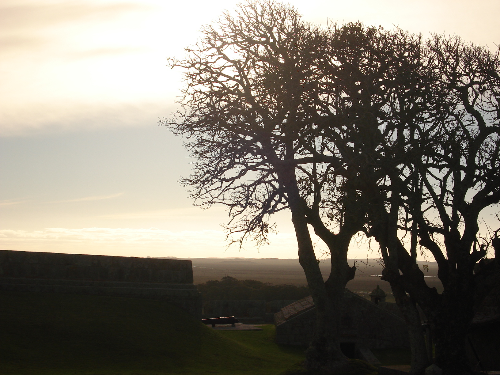 Fortaleza de Santa Tereza, Uruguay